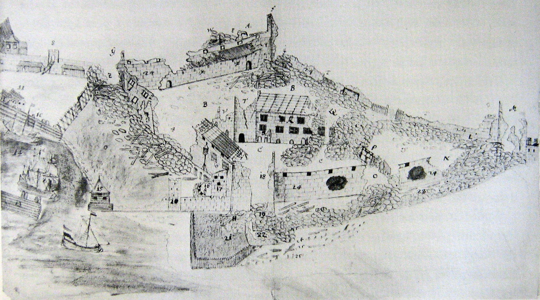 Visborgs slott efter att ha sprängts av danska trupper då de lämnade Gotland. Teckning av J Tideman 5 oktober 1679. Teckningen finns på Kungliga biblioteket i Köpenhamn.